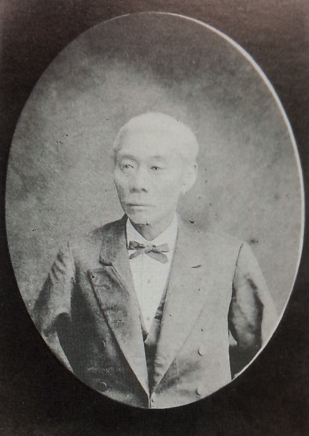 坊城俊政の肖像写真。